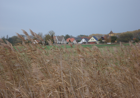 Saaringen